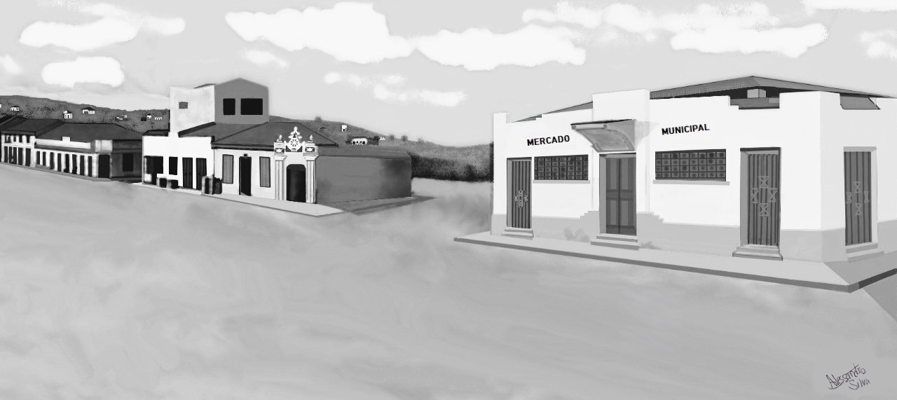 Como descrito antes